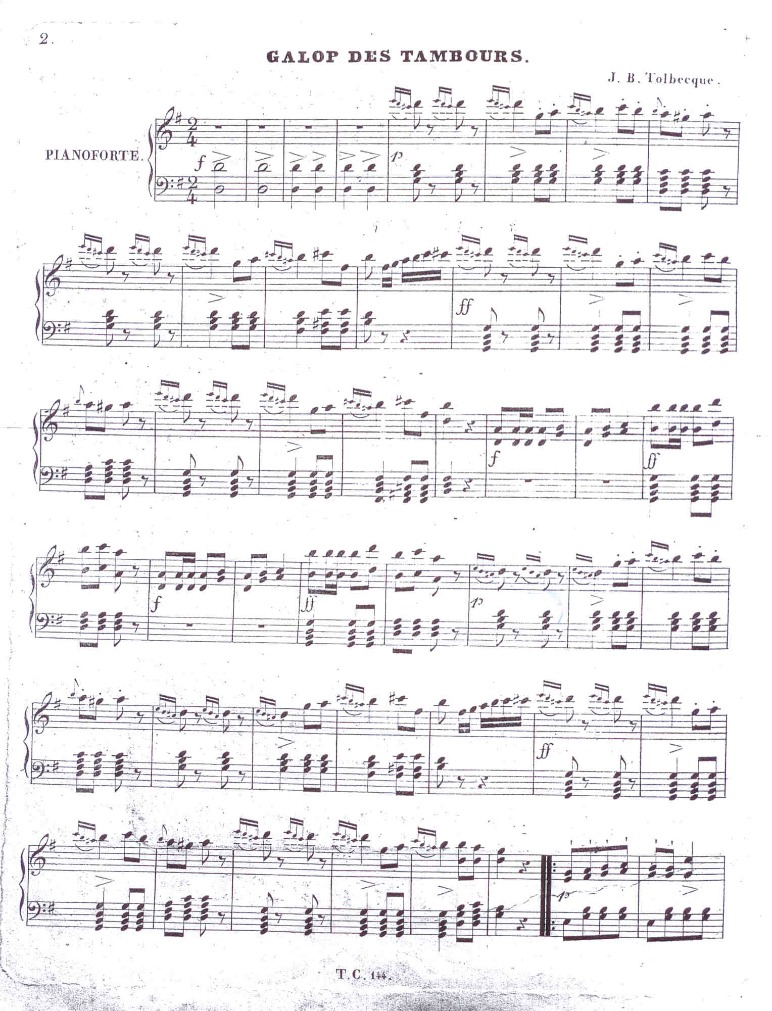 Première page d'une version pour piano du Galop des Tambours de Jean Baptiste Joseph Tolbecque, immense succès aux Carnavals de Paris 1839 et 1840. L'orchestre dirigé par le compositeur comptait 40 tambours. Le bal était organisé au théâtre de la Renaissance.